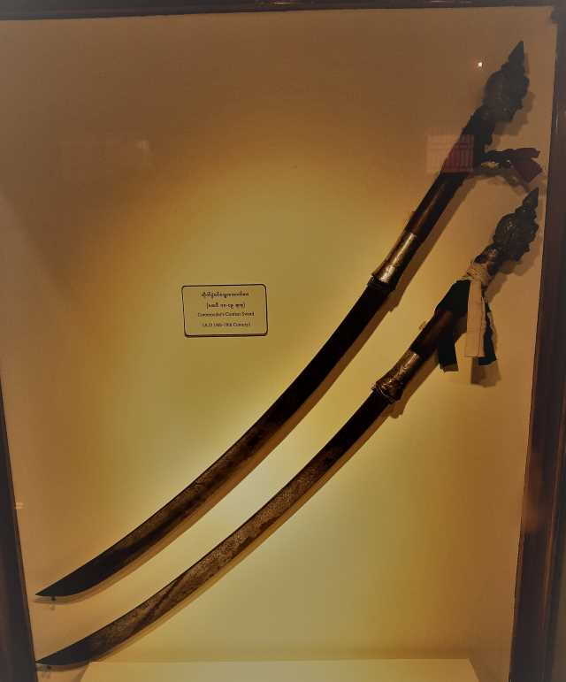 မြန်မာဘာသာ: ရှေးခေတ် မြန်မာ့တပ်မတော် ပင်တိုင်သုံးဓား ဖြစ်သည်။ အိမ်များတွင်လည်း ဆောင်ဓားအဖြစ် အသုံးပြုကြသည်။ ငှက်တောင်နှင်‌့တူသဖြင့် ငှက်ကြီးတောင်ဟု ခေါ်ခြင်းဖြစ်သည်။